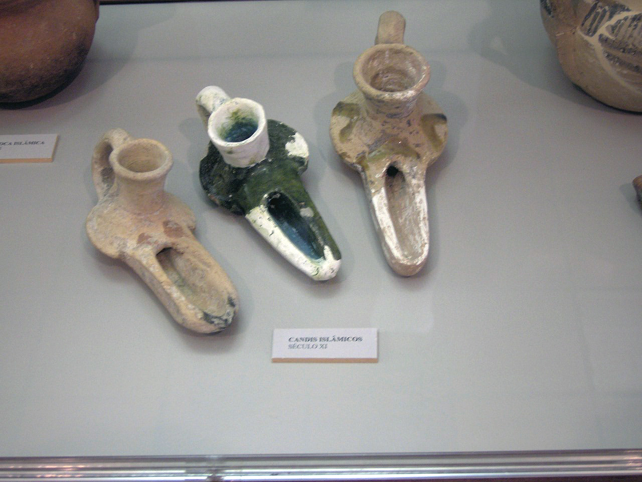 Moorish oillamps (11th c.); Museu da Reinha D. Leonor; Beja, Portugal